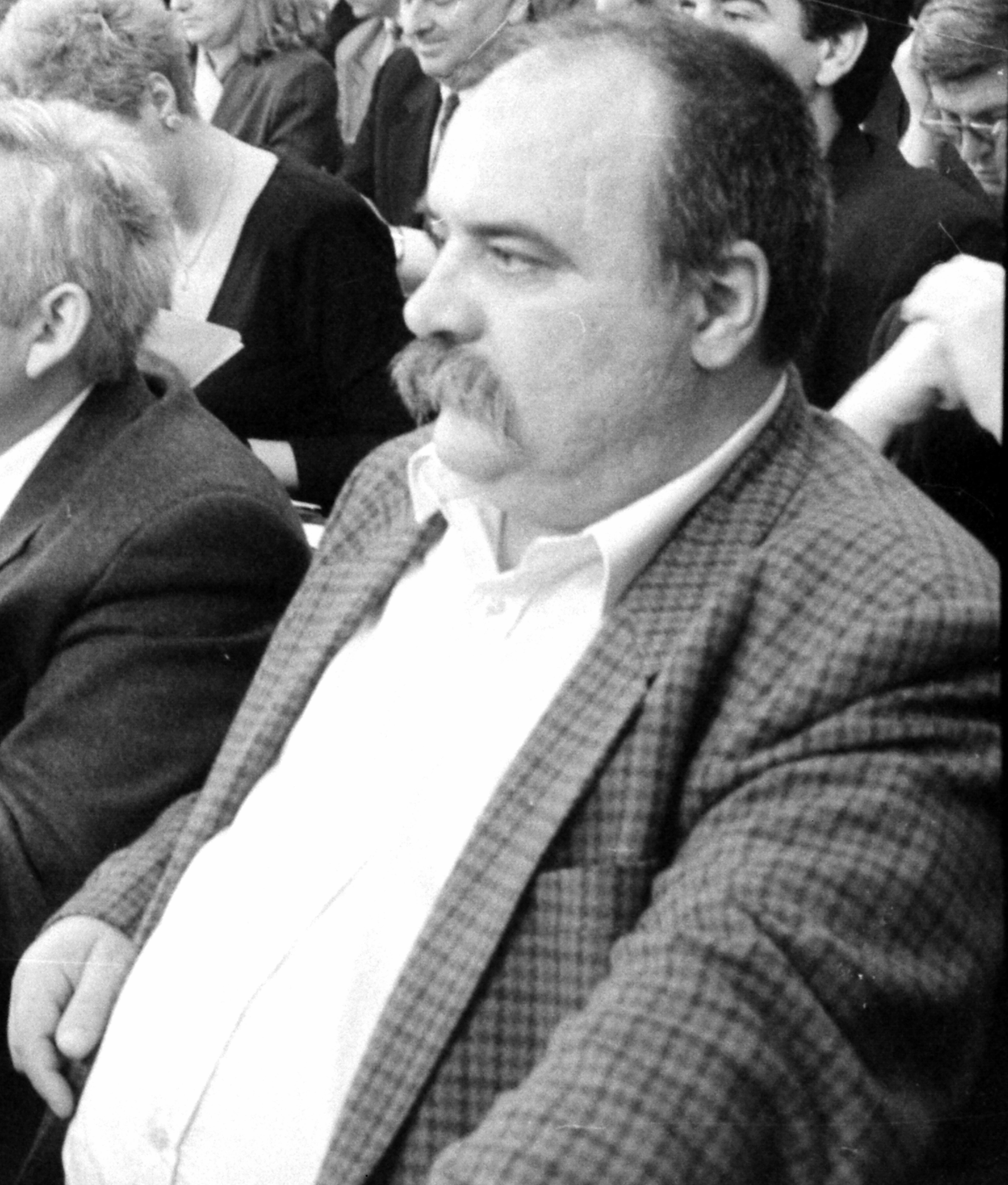 Јожеф Каса(1945-2016)политичар и Шандор Пал(1954-2010) политичари.фото Стеван Крагујевић (по одобрењу кћерке Тање Крагујевић)